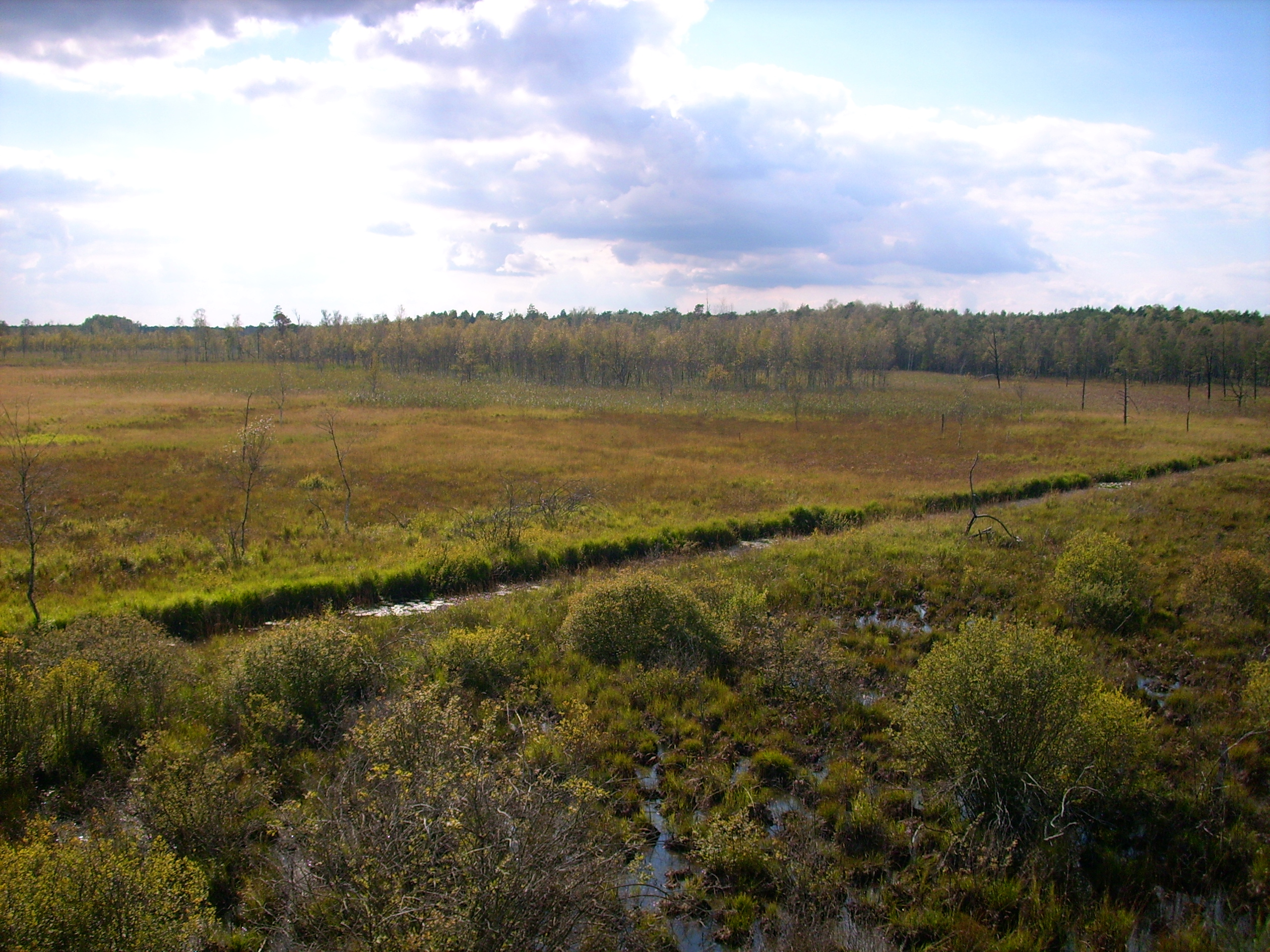 Dubringer Moor bei Wittichenau